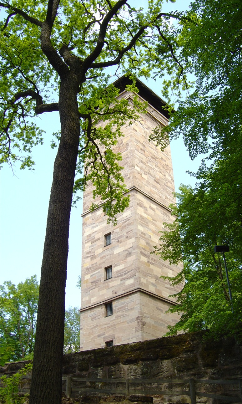 Der Turm der Alten Veste nach dem Wiederaufbau 1980